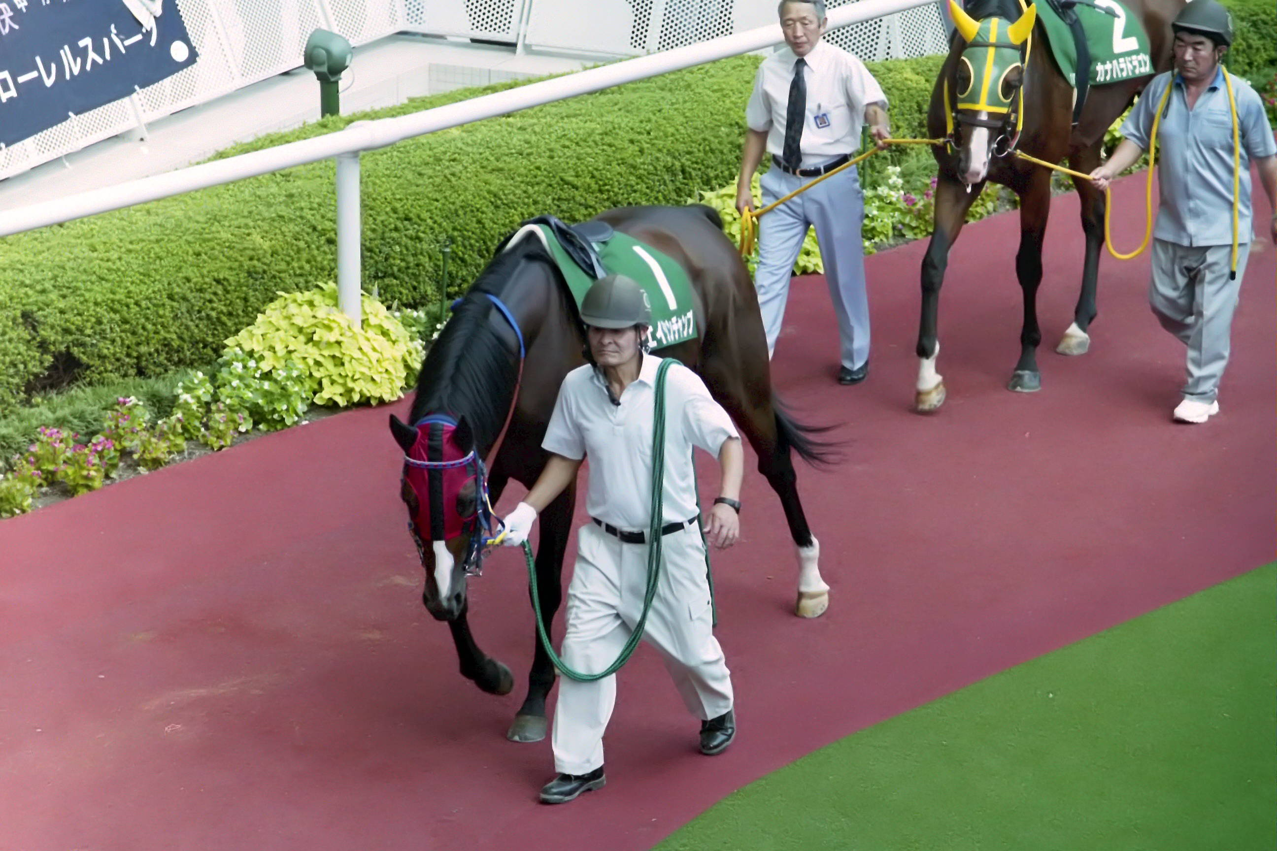 エイシンチャンプ号